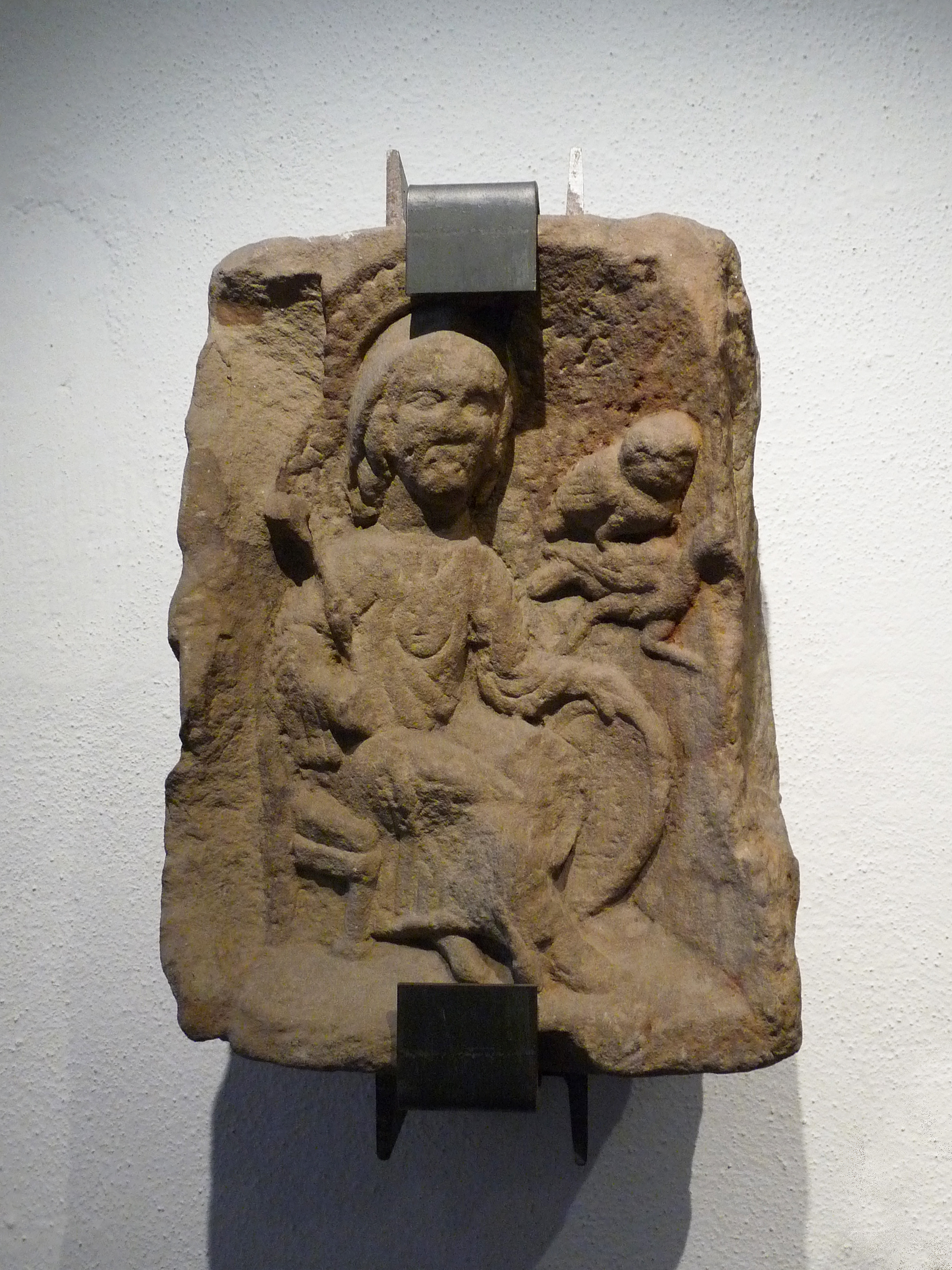 Minerve, assise dans un fauteuil, associée à une chouette attaquant un coq. Milieu du 3e siècle après JC. Trouvée à Pisdorf. Musée archéologique de Strasbourg